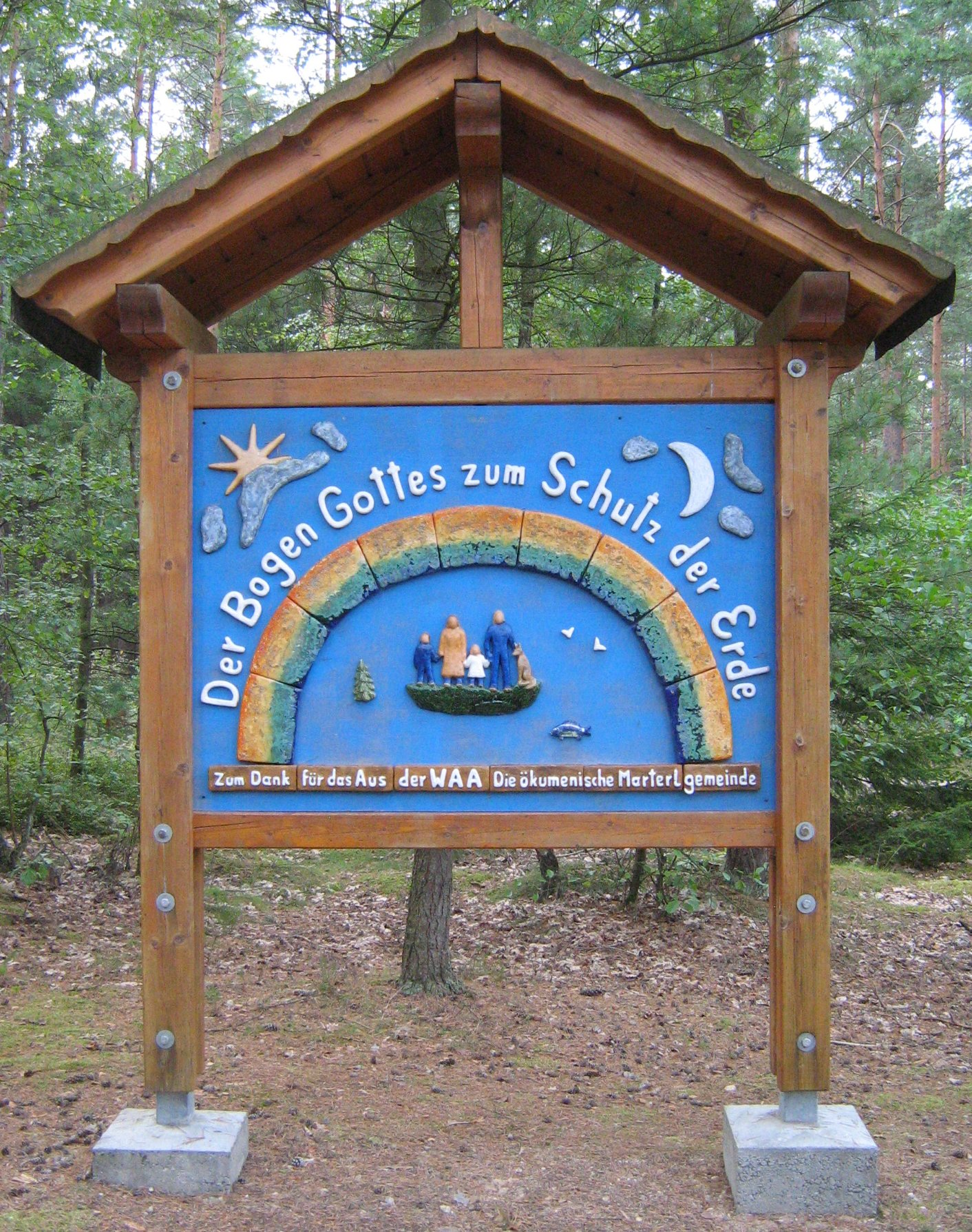 Dank-Tafel der Franziskus-Marterl-Gemeinde für das Aus der Wiederaufarbeitungsanlage Wackersdorf Inschriften: Der Bogen Gottes zum Schutz der Erde Zum Dank für das Aus der WAA - Die ökumenische Marterlgemeinde